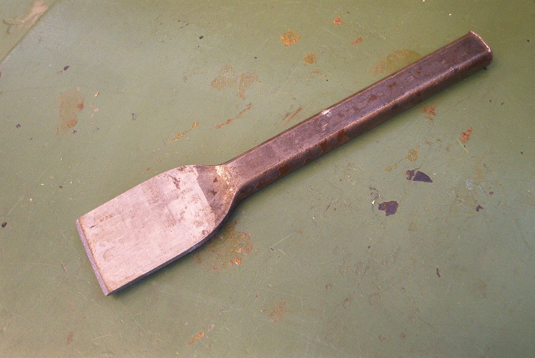 Foto van een klezzor of voegbeitel.